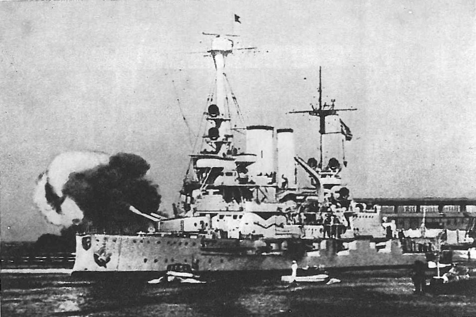 Salwa pancernika "Schleswig-Holstein", Gdańsk, wrzesień 1939 r.